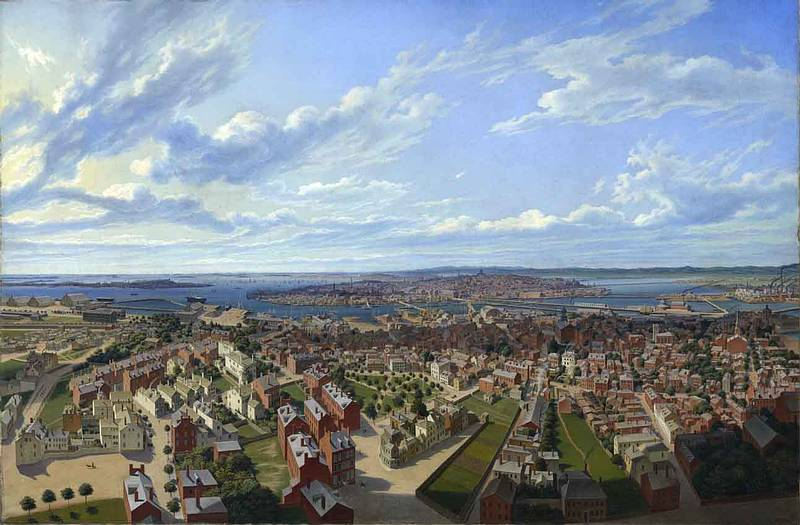 Boston, Hauptstadt von Massachusetts in Nord-Amerika